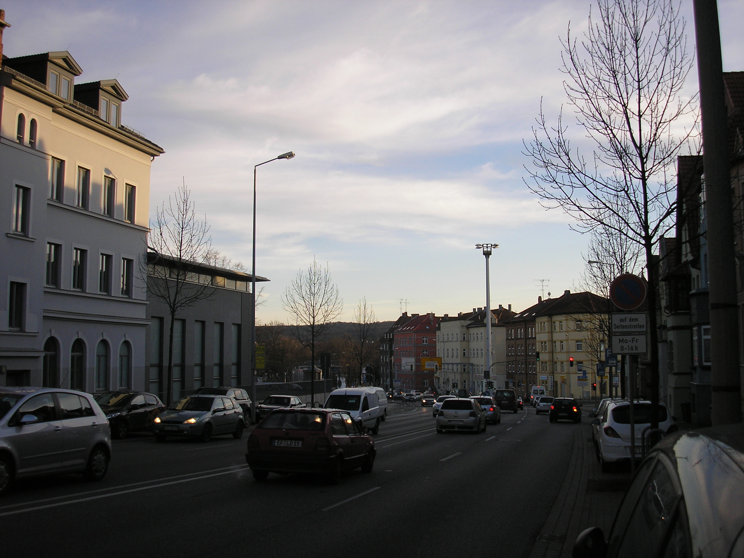 Blick auf den Gothaer Platz in Erfurt.